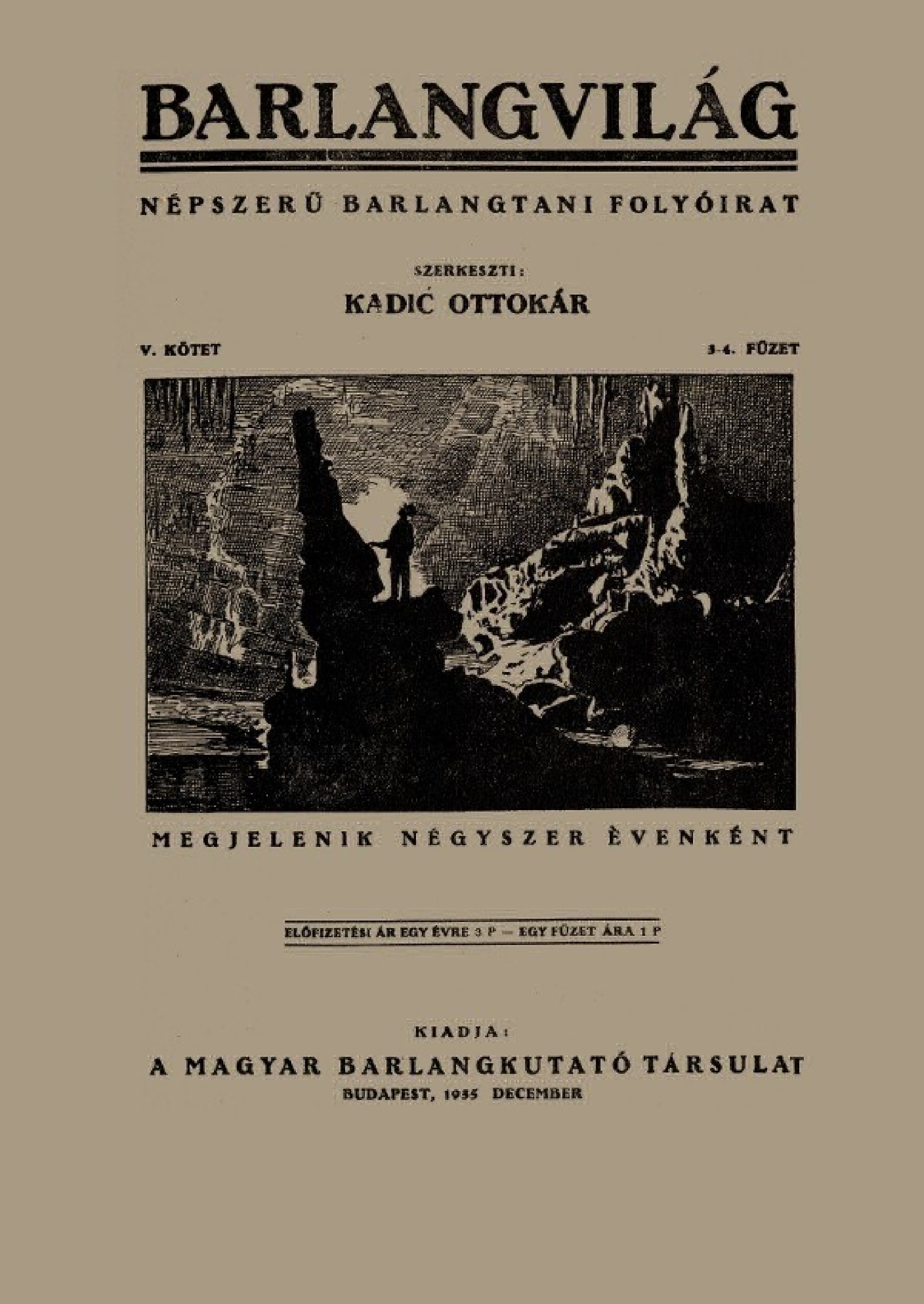 A Barlangvilág című folyóirat 1935. évi 3-4. füzetének borítója. Balogh Rudolf fényképének felhasználásával.